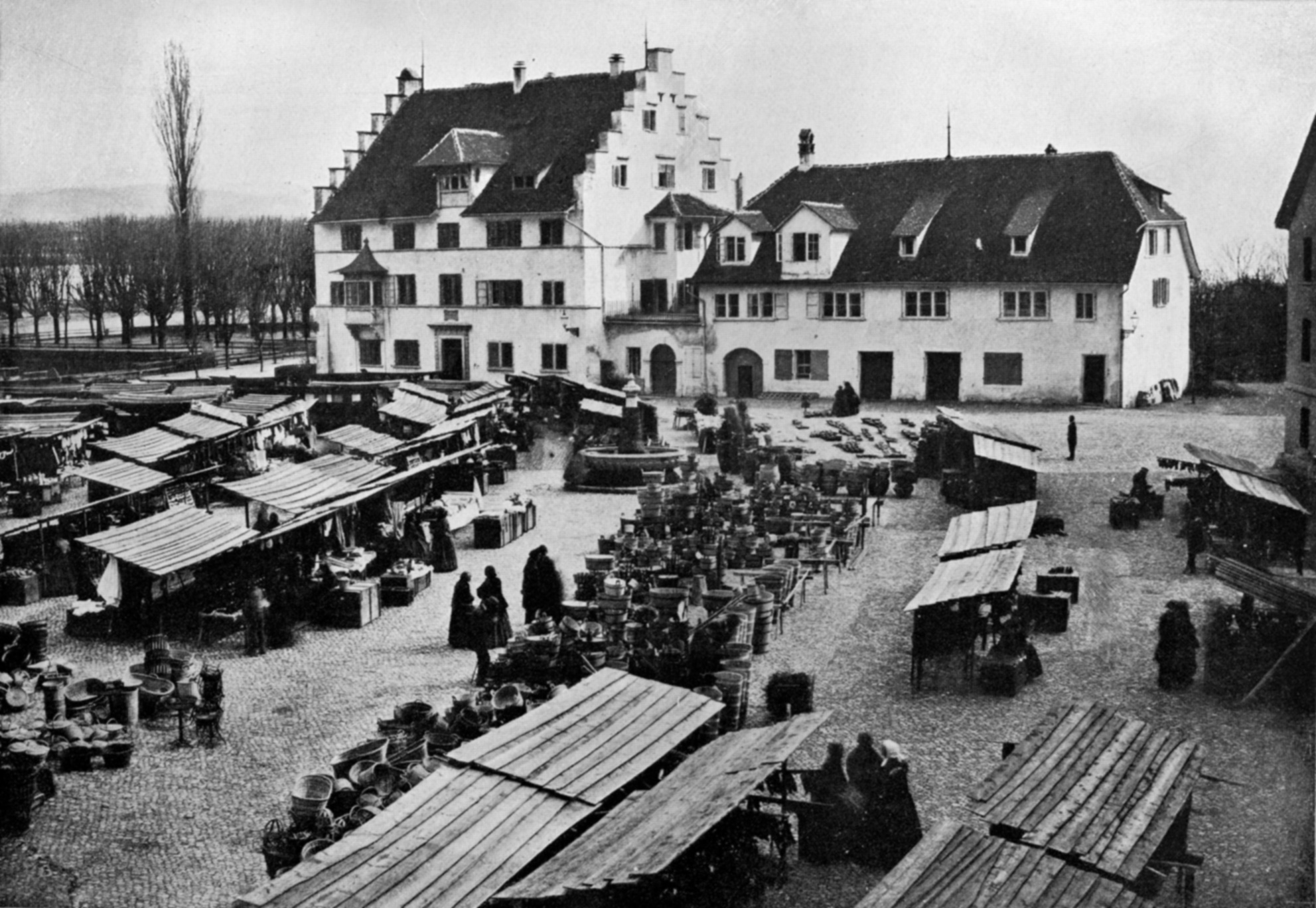 Das alte Stadthaus von Zürich